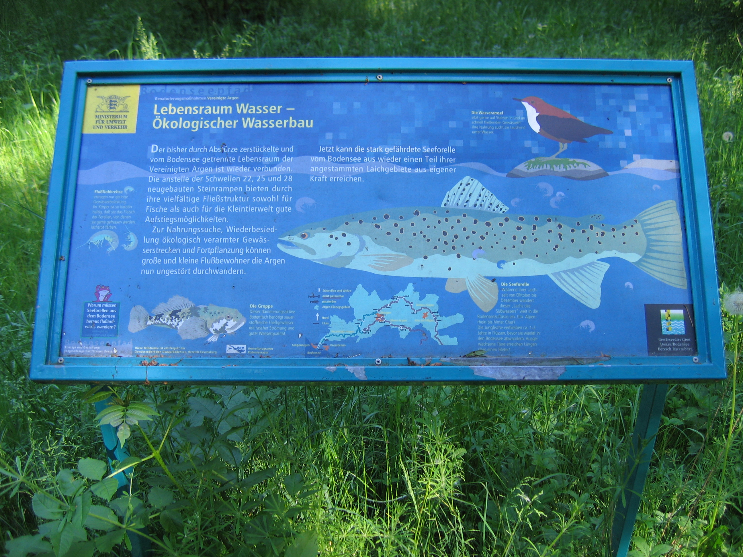 Bodenseepfad: L.A., Infotafel "Lebensraum Wasser"